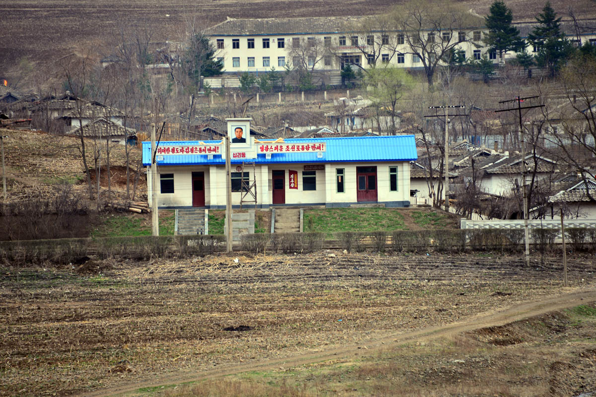 Pukpu Line (Hyesan Manpho Chongnyon Line) オクトン駅 (十里洞駅) 옥동역 (십리동역) Oktong (Simridong) 十里洞站